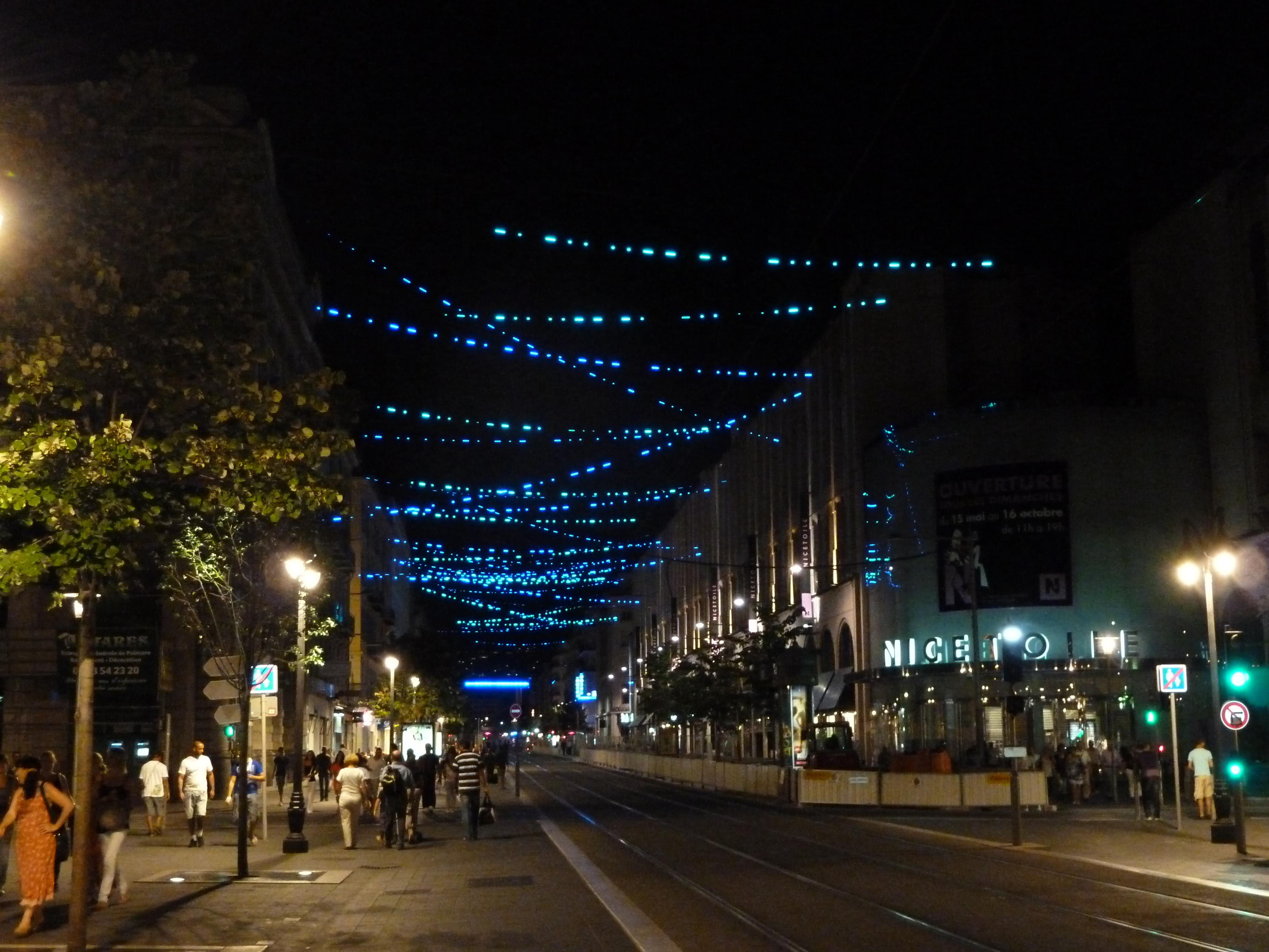 Œuvre "L’amorse du bleu" de Yann Kersalé sur l’avenue Jean Médecin, Nice